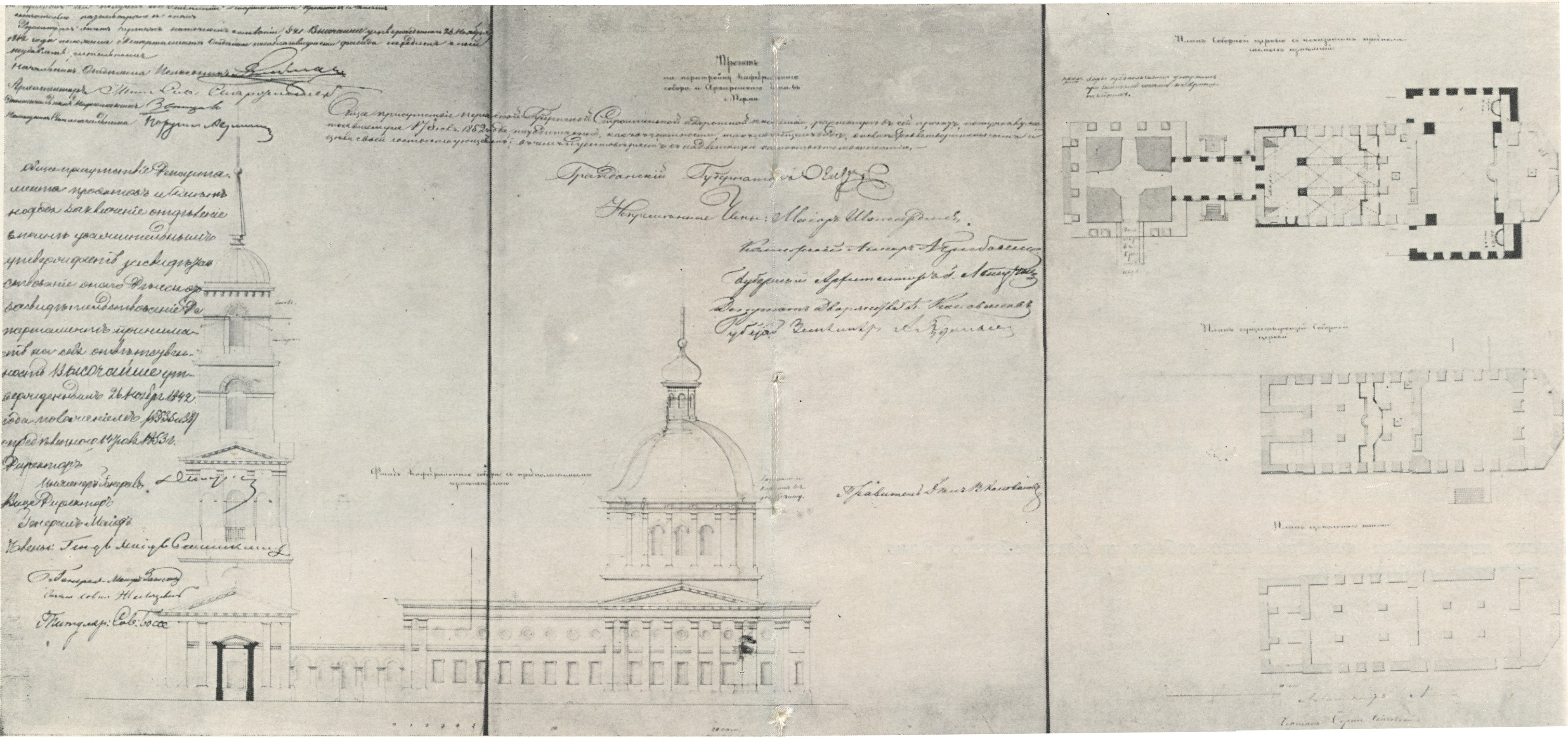 Проект на перестройку кафедрального собора и архиерейского дома в г. Перми 1852